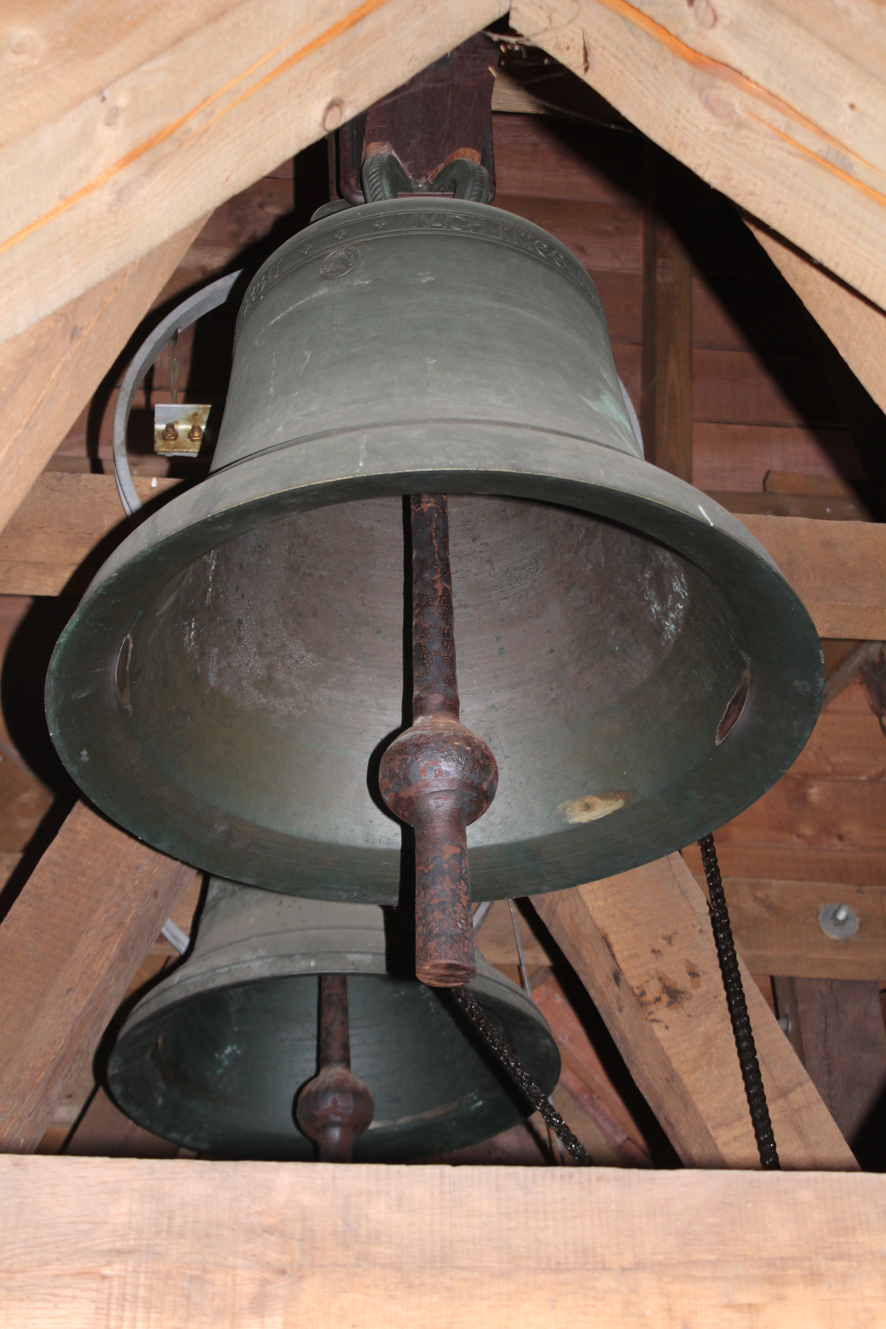 Alte Kirche Weidenhausen, Gemeinde Hüttenberg, Lahn-Dill-Kreis, Hessen, Deutschland